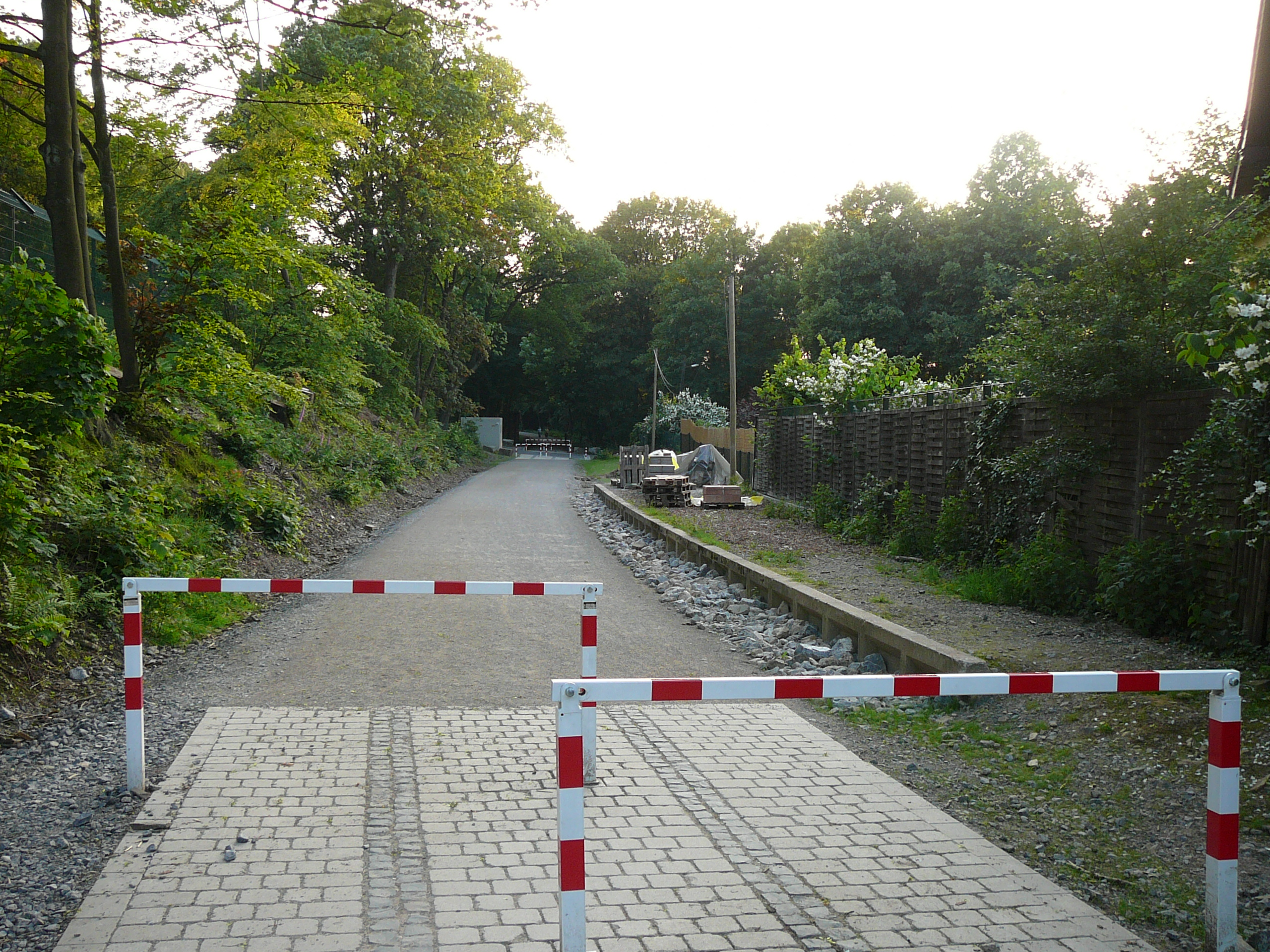 Historischer Haltepunkt Wuppertal-Boltenberg